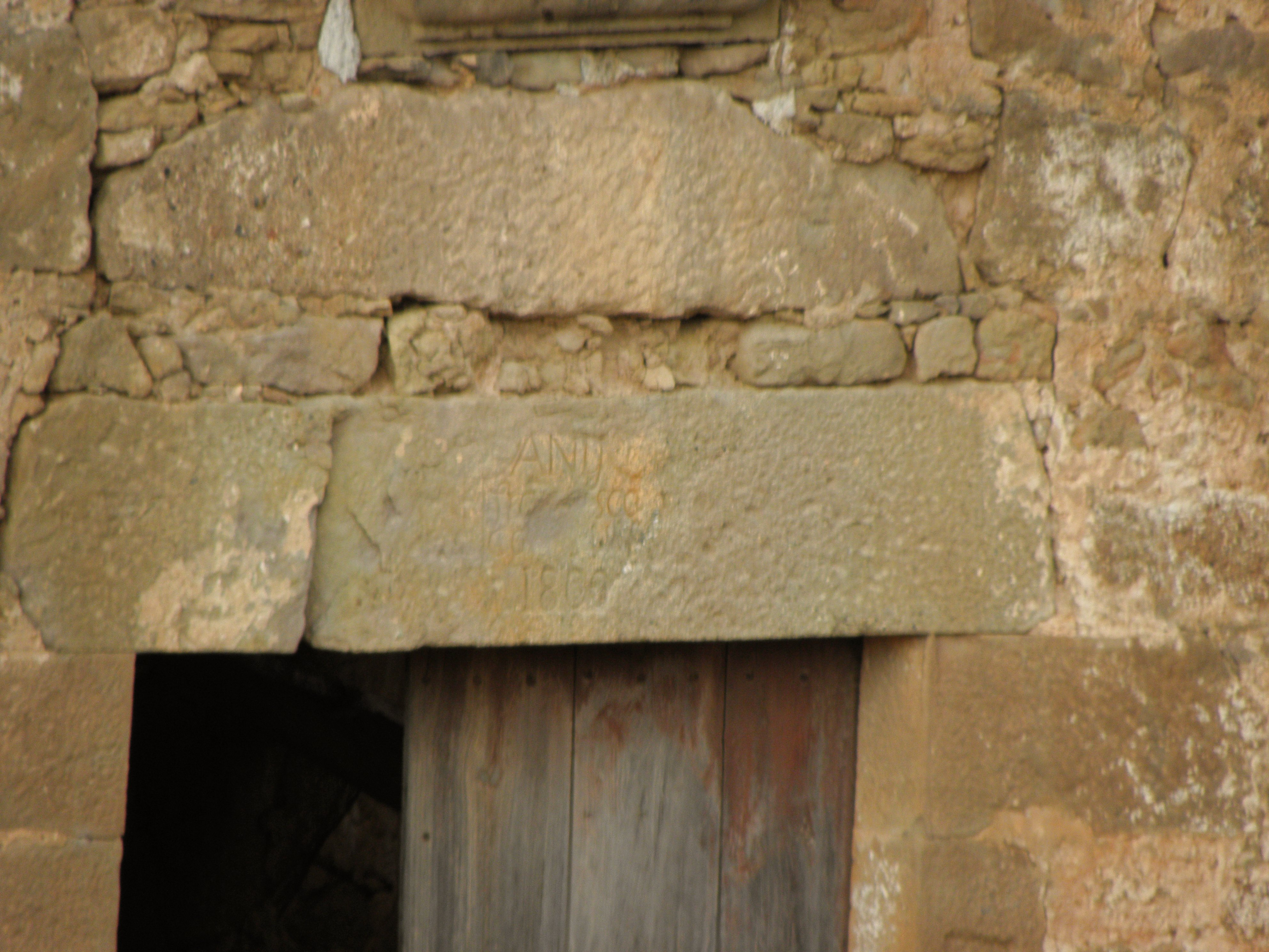 La llinda de la portalada principal de Can Capità, al poble de Sallent (Pinell de Solsonès).